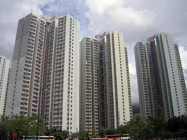 Fu Tung Estate, Tung Chung, Lantau Island, New Territories, Hong Kong